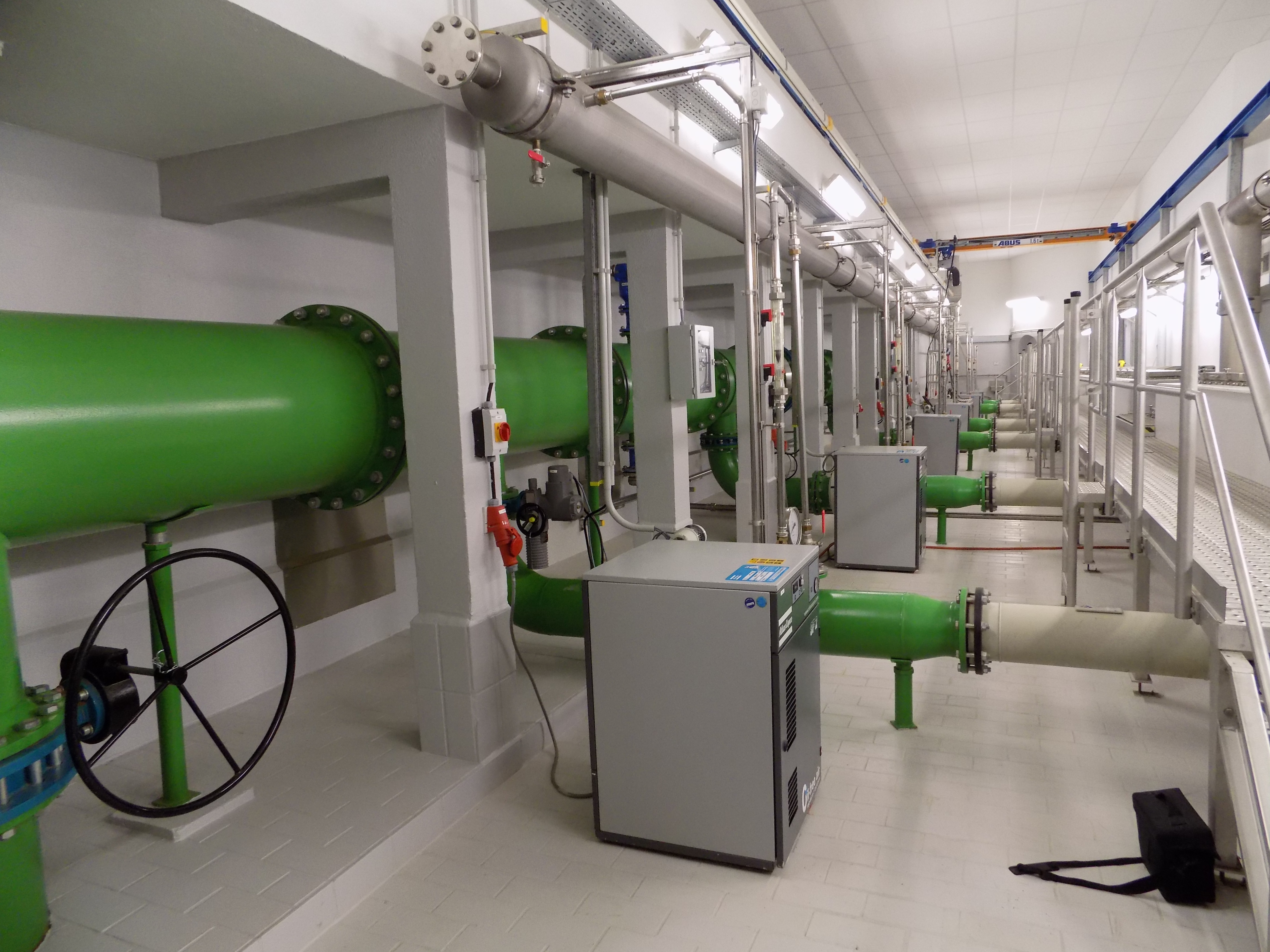 Wasserbelüftungsanlage